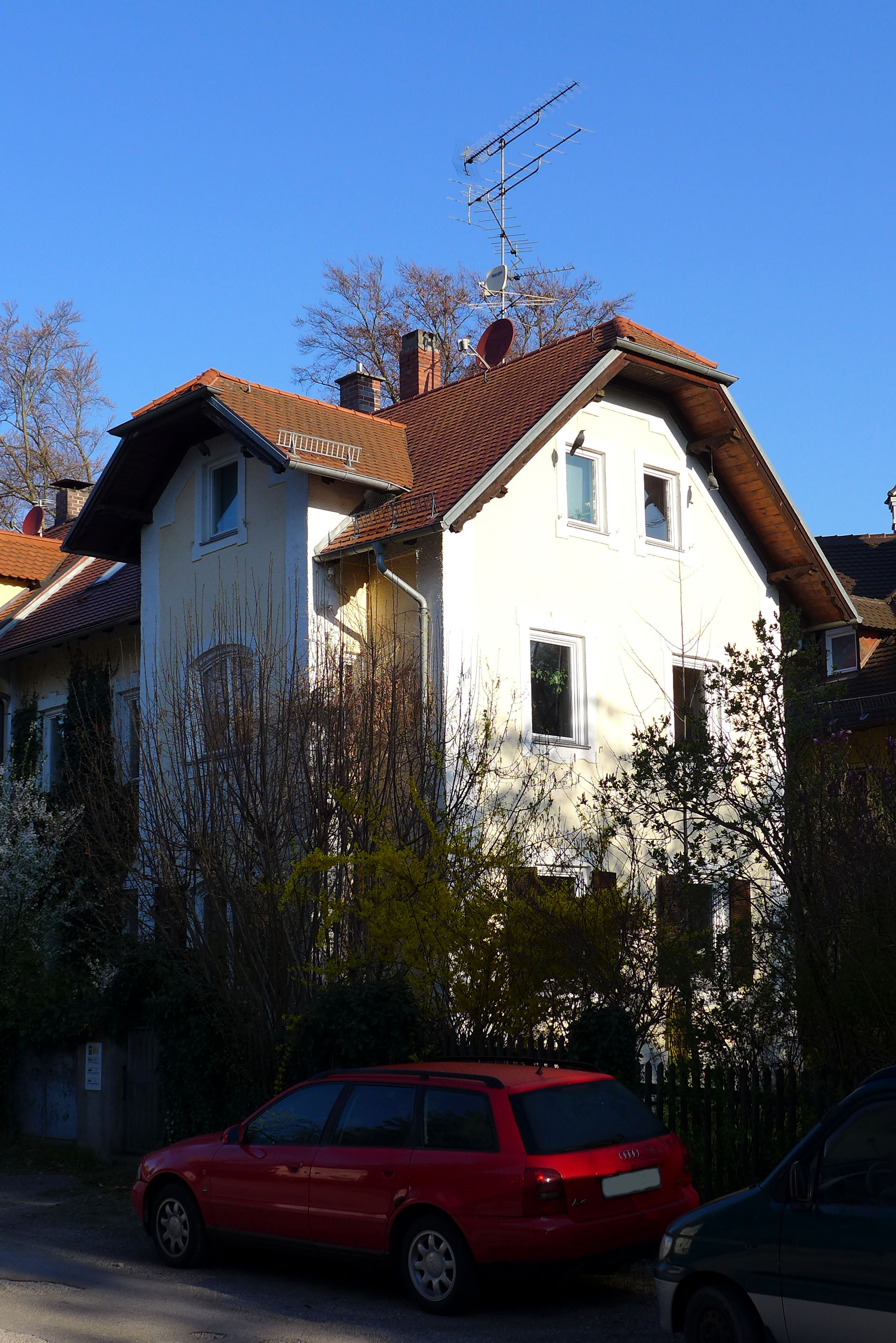 Rembrandtstr. 2, München